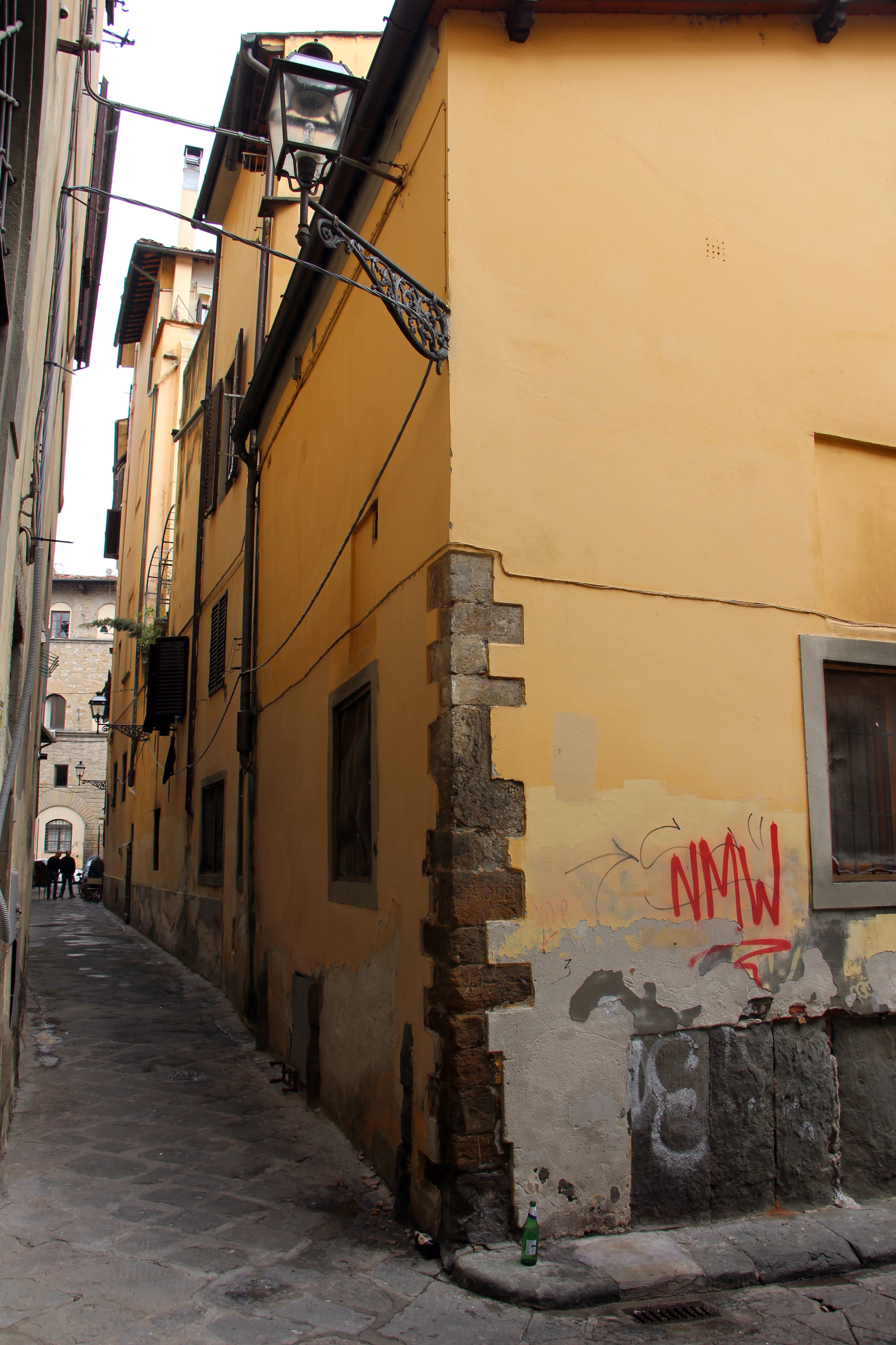 Via del Canto Rivolto, Firenze